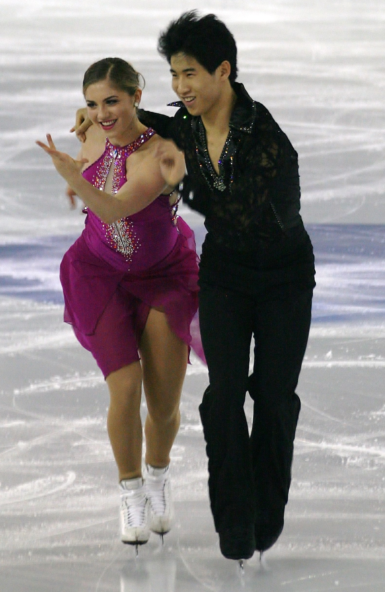 Мадлен Эдвардс и Чжао Кай Пан (Канада) на финале Гран-при среди юниоров 2014-2015.